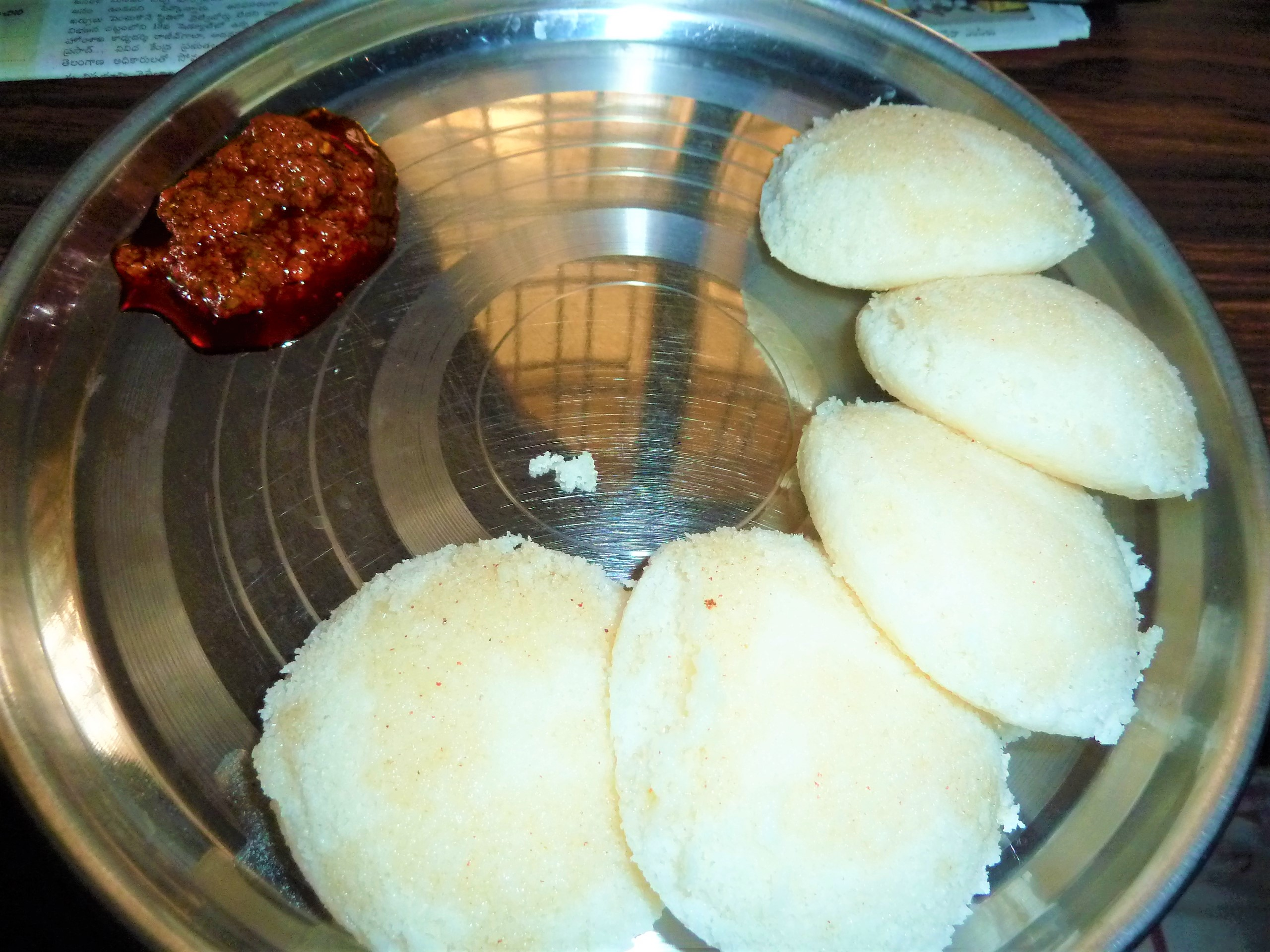 ఇడ్లీలు - నెయ్యి, కొత్త ఆవకాయ